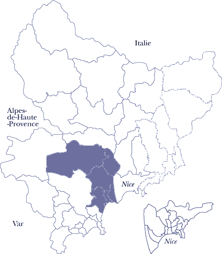 Carte montrant la 6e circonscription des Alpes-maritimes issue du découpage de 1986 (en vigueur de 1988 à 2007). Cette carte est issue d'un support trouvé sur le site du conseil général des Alpes-Maritimes, retravaillé par mes soins.